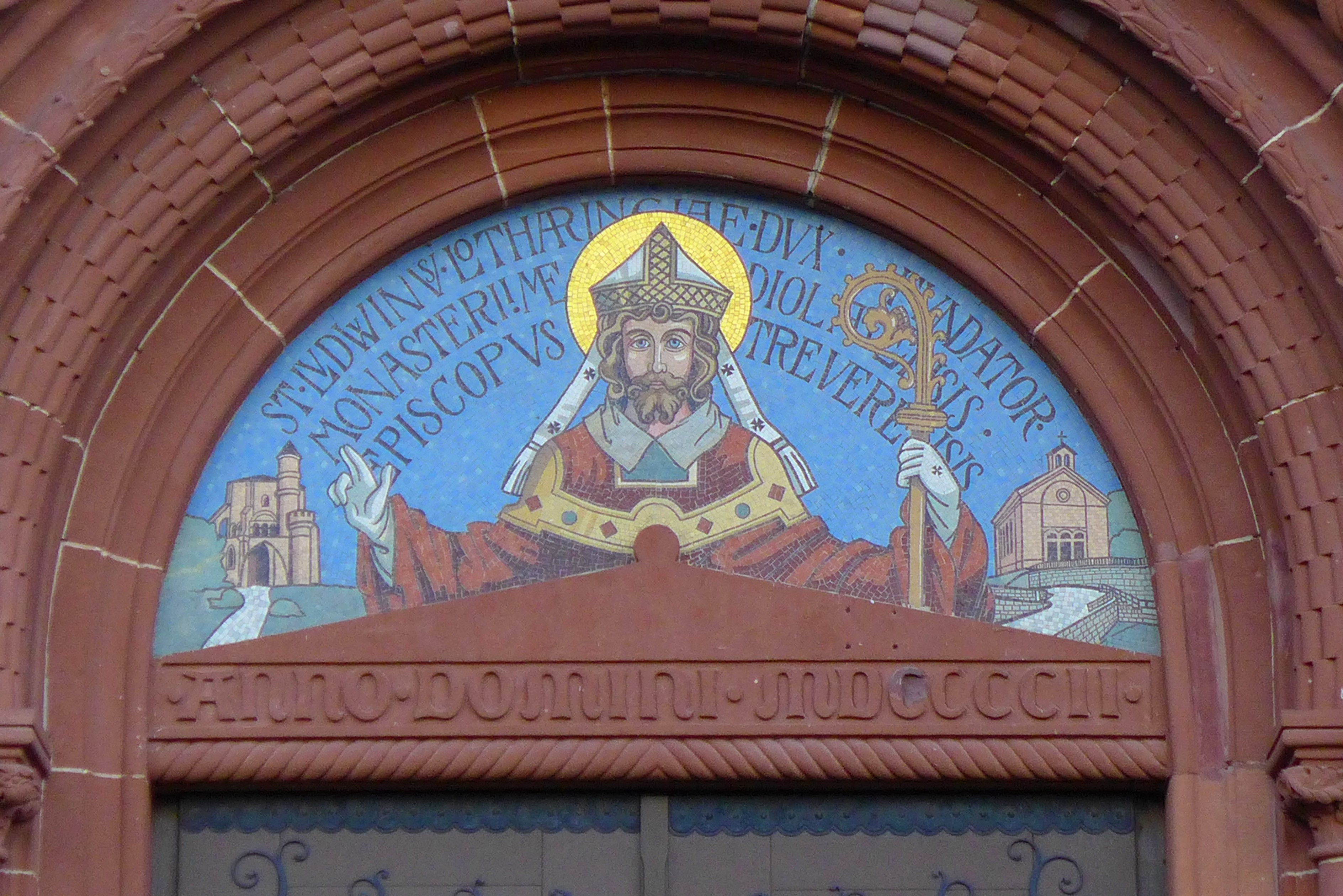 St. Luitwin (Mettlach), Bogenfeld des Portals